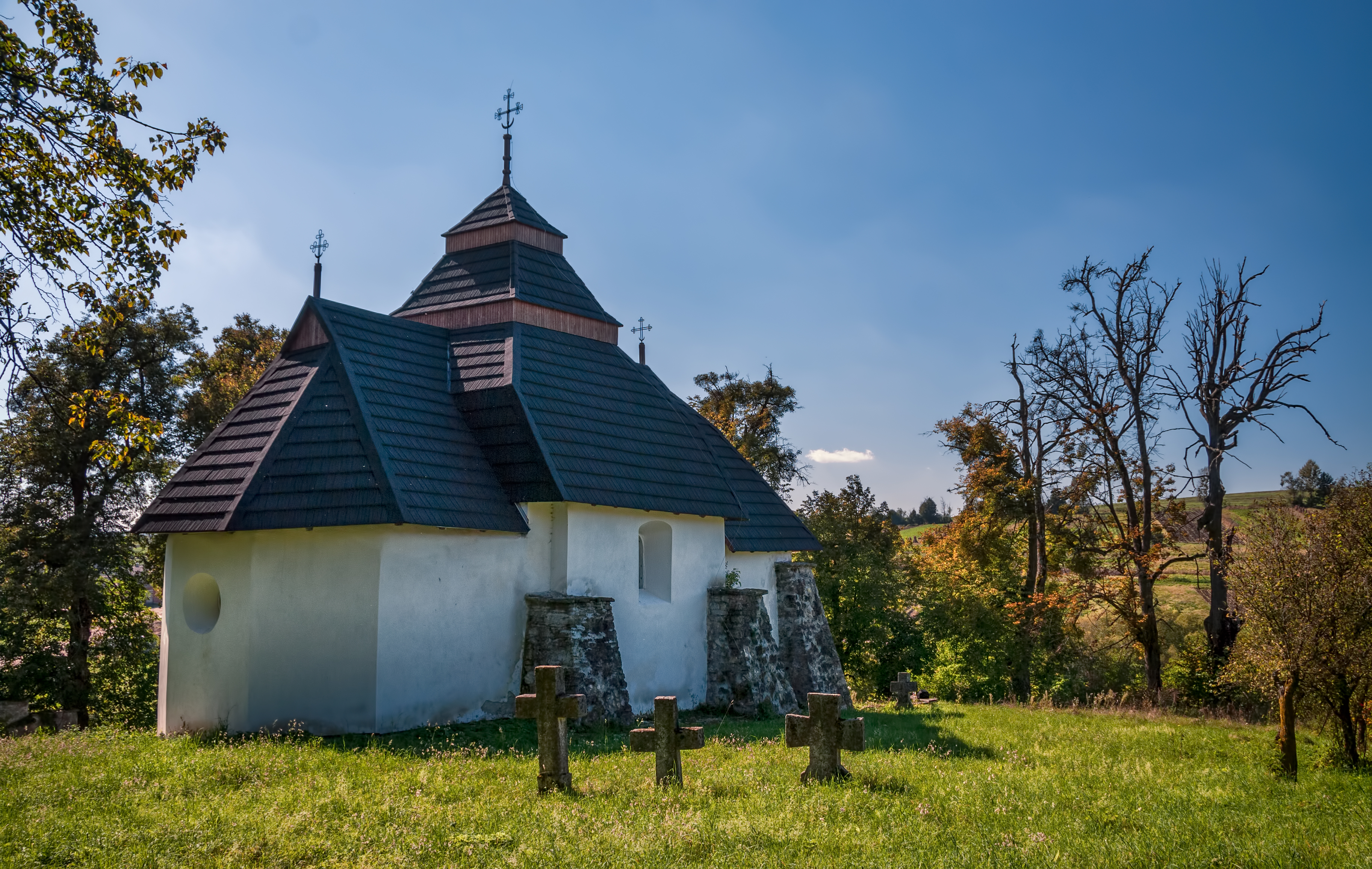 Церква Св. Миколая, Чесники